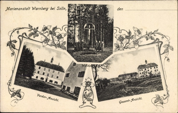 Postkarte der Marienanstalt Warnberg in München-Solln.Gelaufen 1917. Die Karte zeigt drei Motive: links unten der Hauptbau (vor der Erweiterung von 1927), rechts unten die Gesamtanlage, dazwischen das große Standkruzifix, heute vor dem Neubau der Realschule